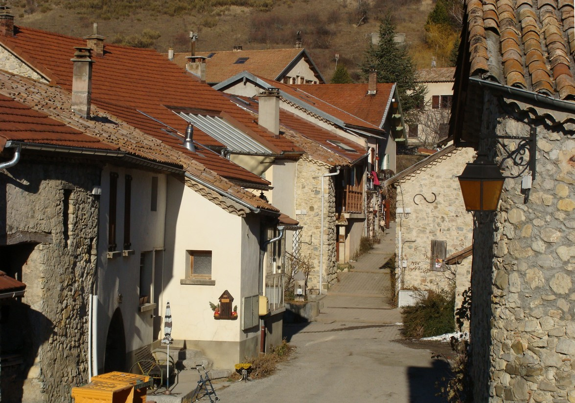 Saint-Auban-d'Oze (Hautes-Alpes) : rue centrale du village.